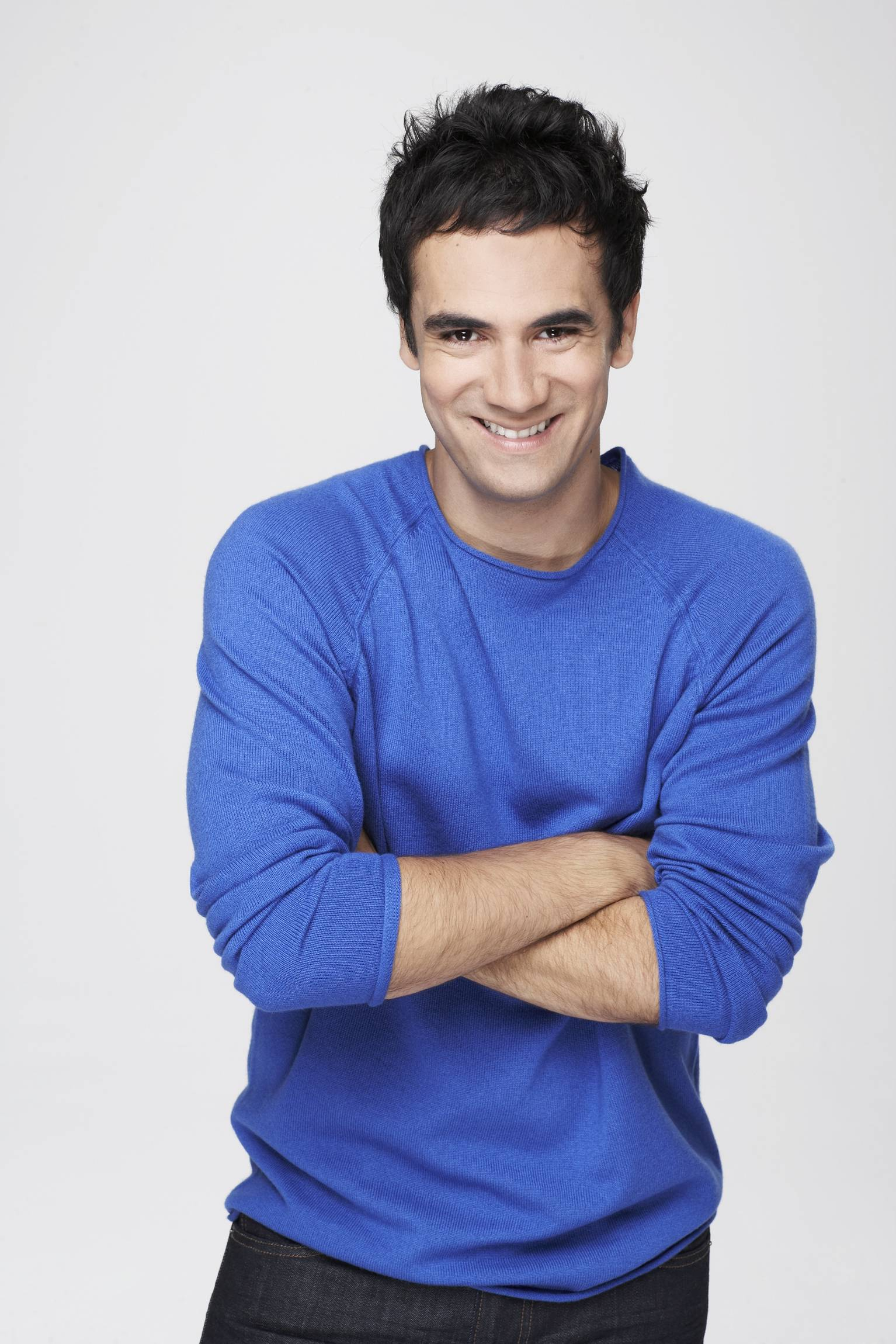 Alex Goude au shooting M6